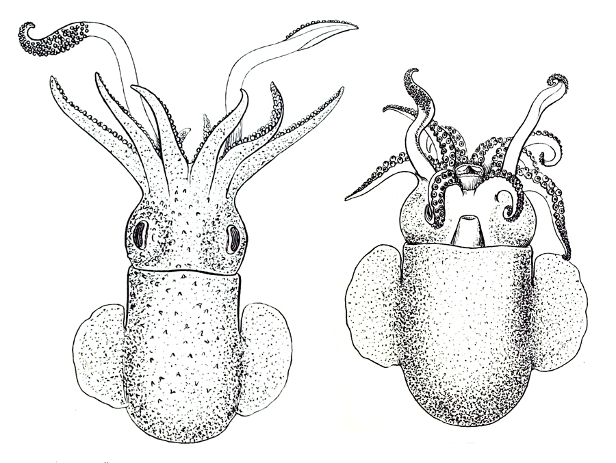 Rossia glaucopis dorsal (23 mm ML) and ventral (31 mm ML) views